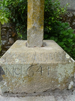 Detalle do cruceiro da costa, base.